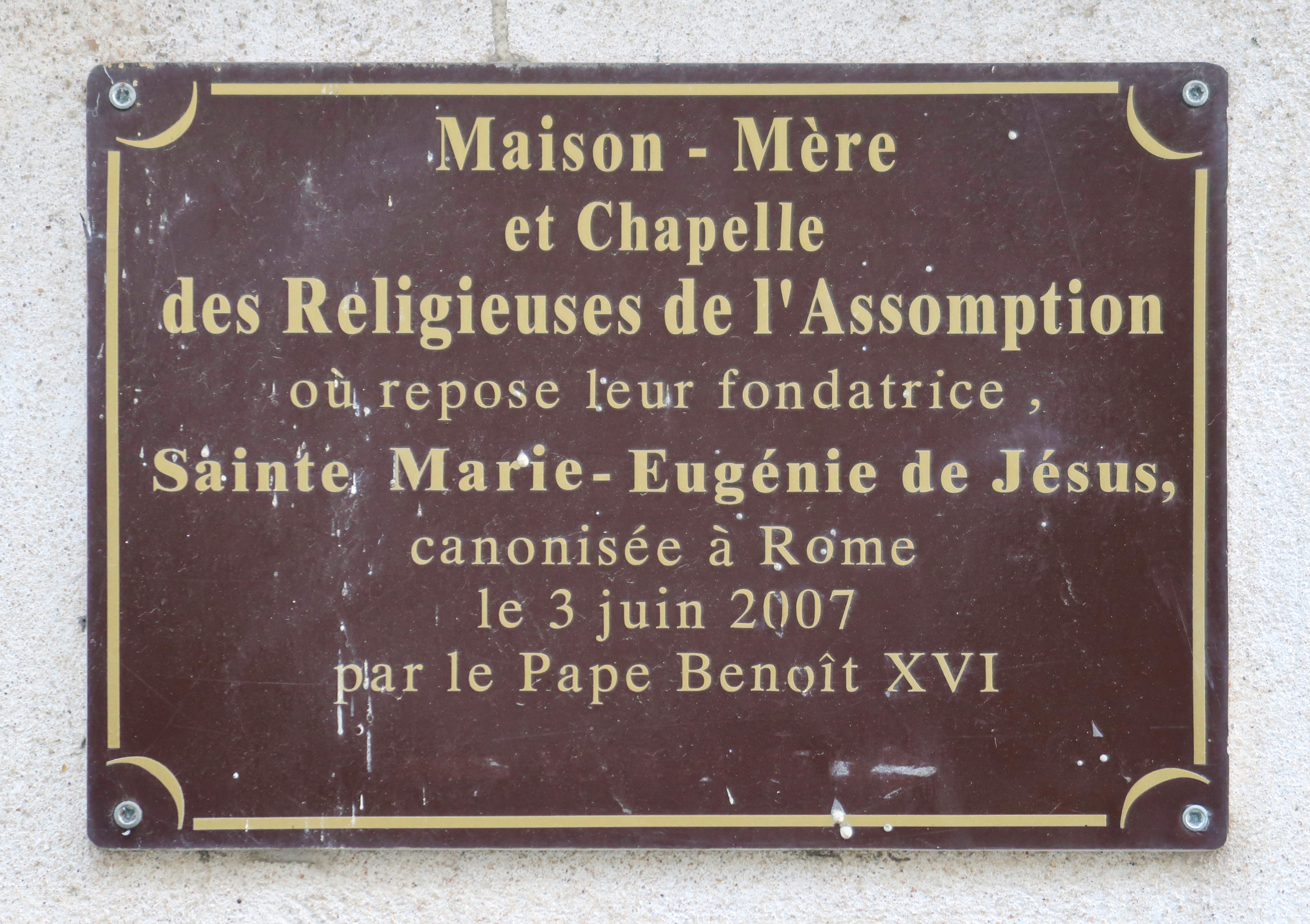 Plaque à l'entrée de la maison-mère des Religieuses de l'Assomption, 17 rue de l'Assomption (Paris, 16e).